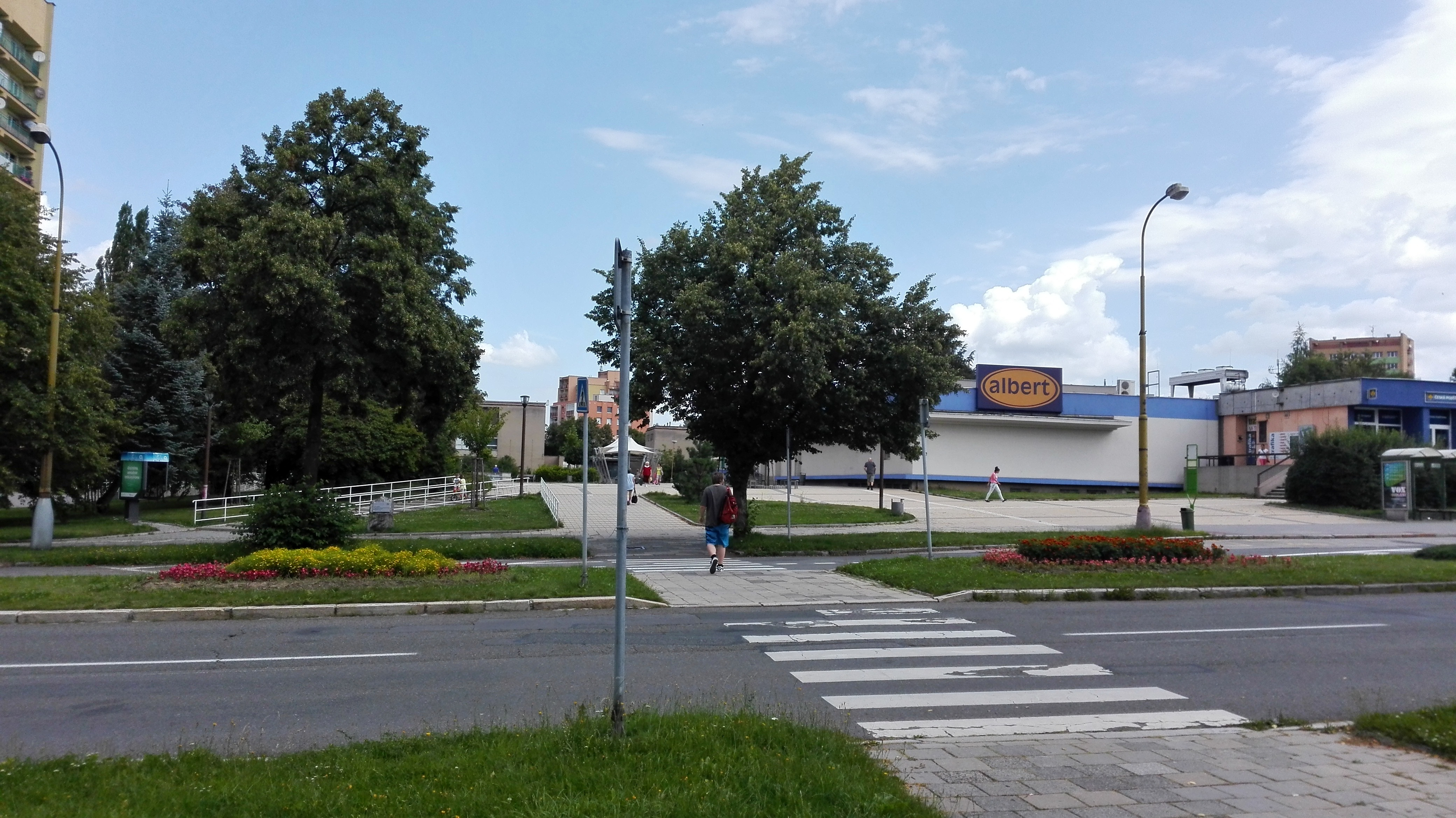 Tzv. Náměstí Na Terase se supermarketem.